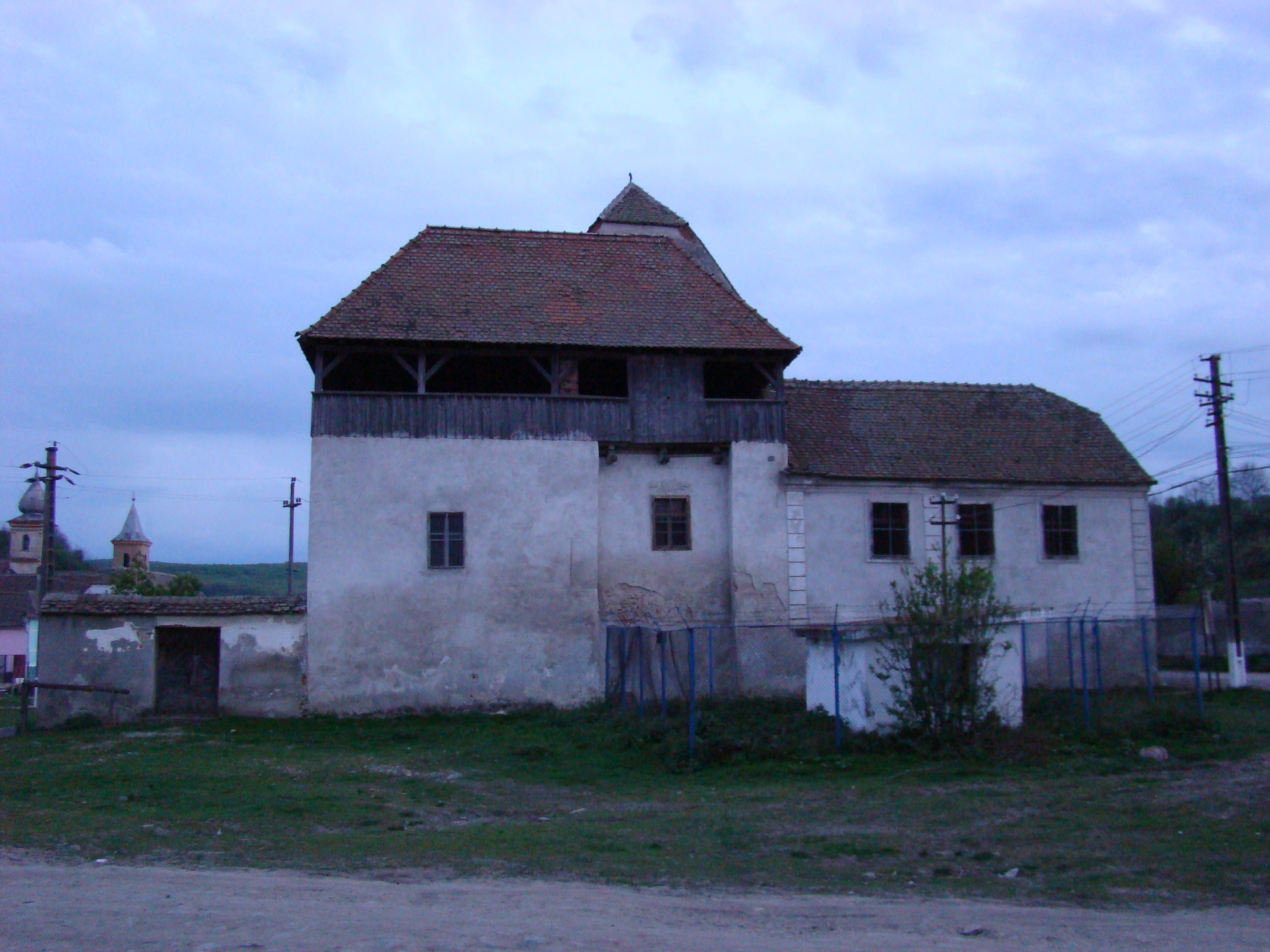 Glockenturm mit Pfarrhaus der evangelischen Kirche in Boz (Bußd), Alba, Siebenbürgen, RumänienRomână: Turnul clopotniţei cu casa Pastorului al bisericii evanghelice din Boz (Bußd), Alba, Transilvania, România